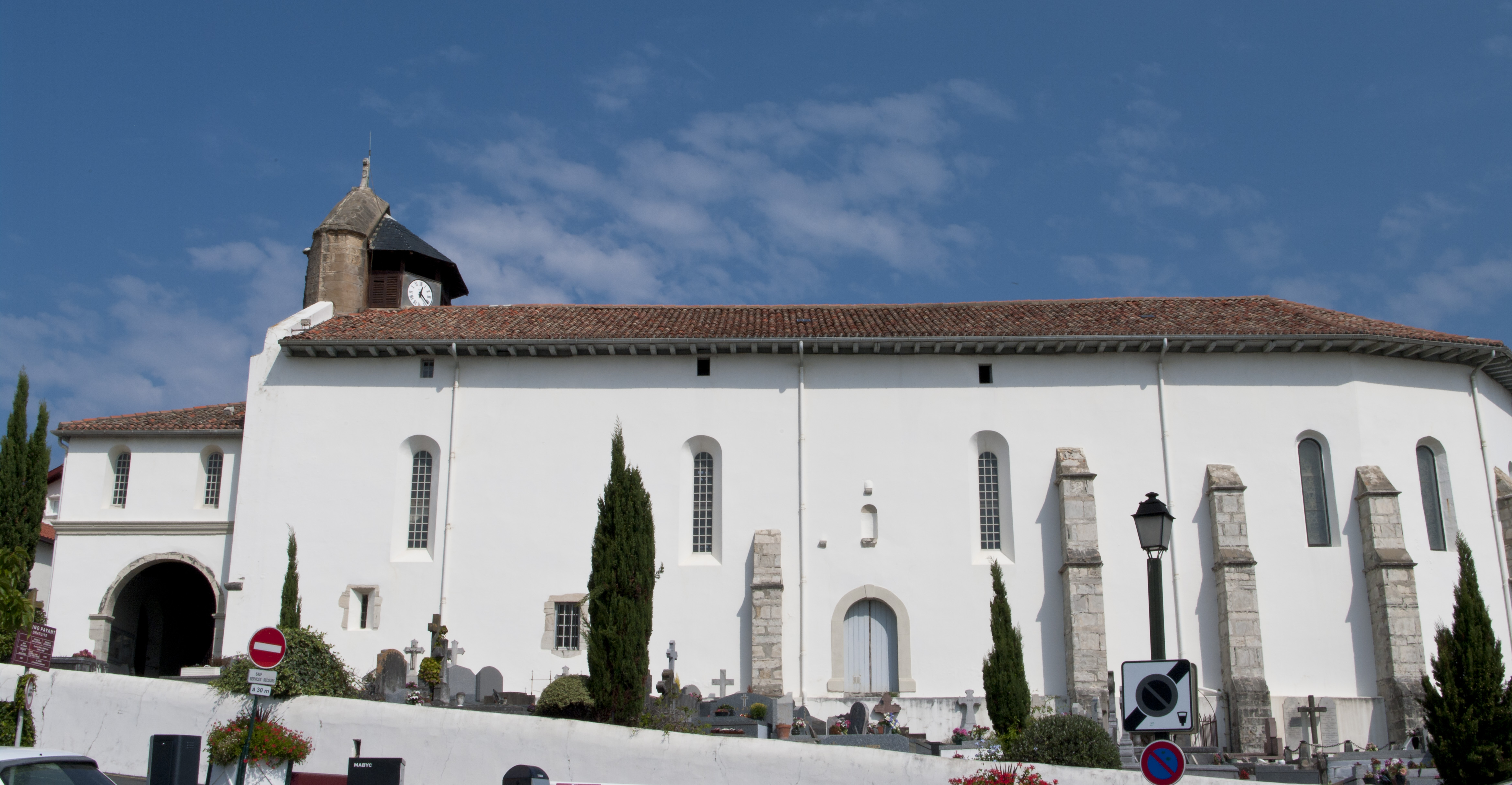 L'église Notre-Dame-de-l'Assomption est un lieu de culte catholique situé dans la commune de Bidart, dans le département français des Pyrénées-Atlantiques. .